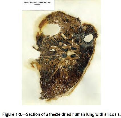 Обеспыливание при добыче угля в шахах США. Фиг. 1.3 Часть лиофилизированного лёгкого человека, болевшего силикозом